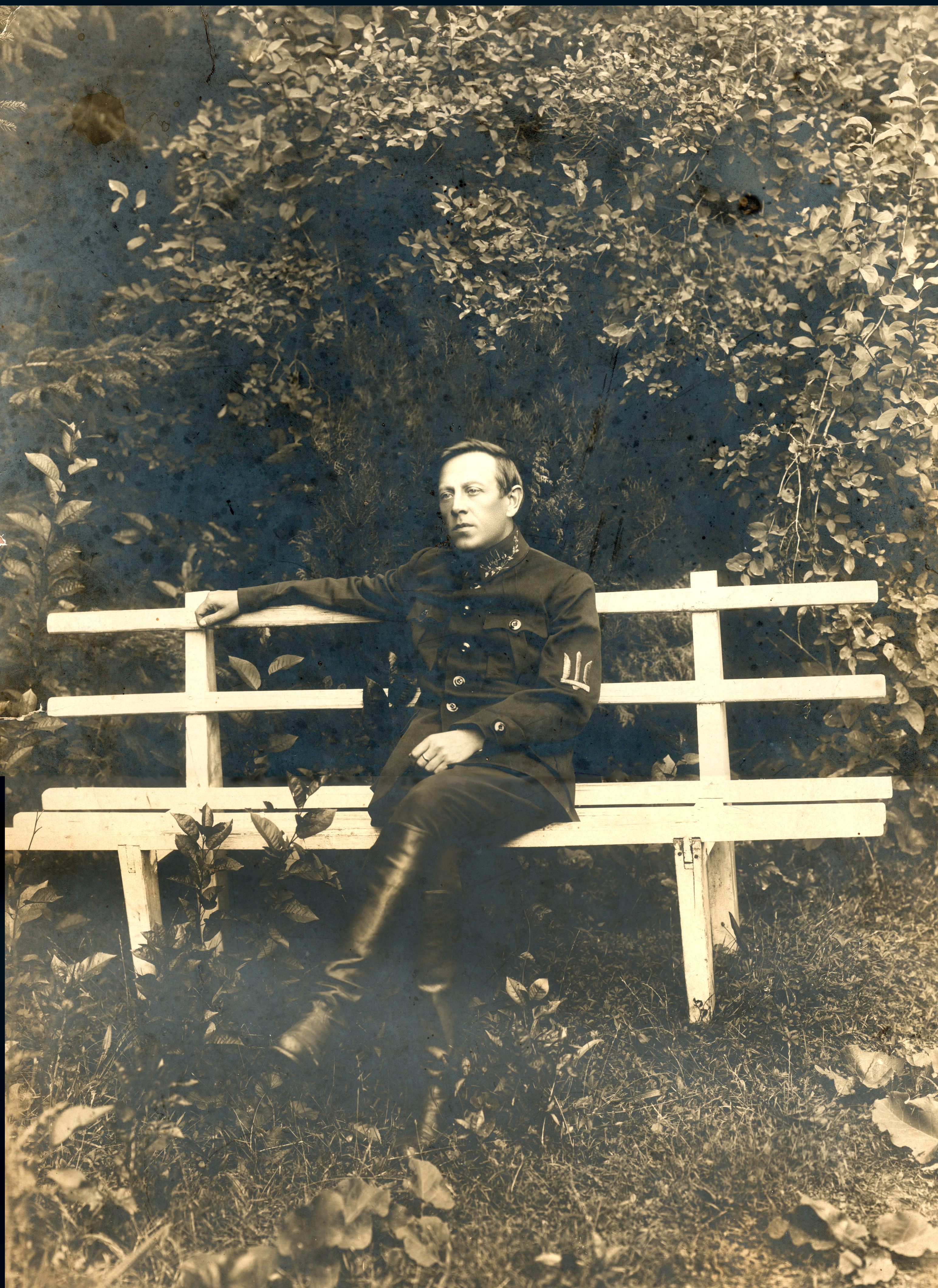 Symon Petlura (1879-1926)in Kamieniec Podolski 1919